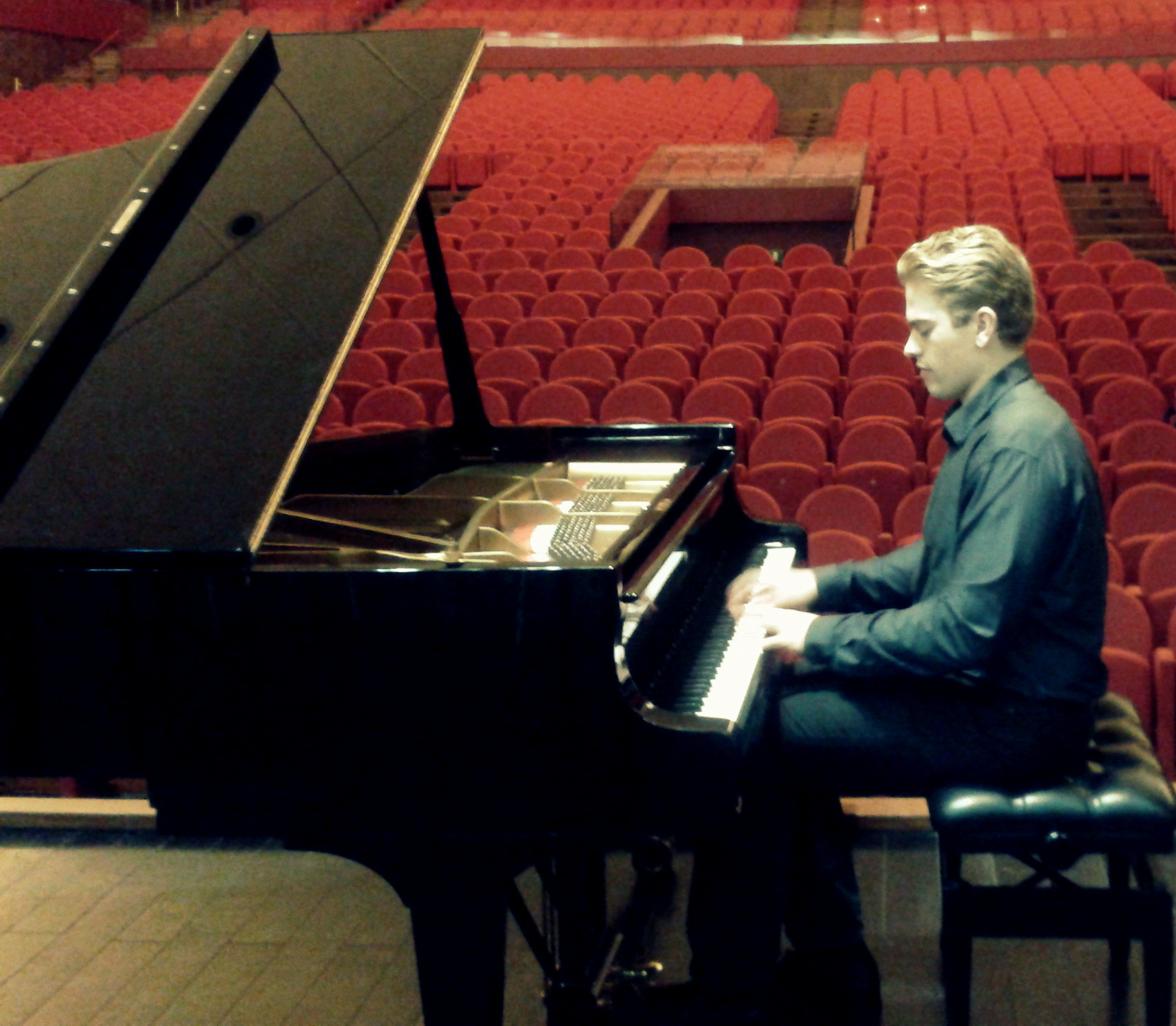 Joseph Moog